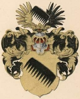 Anrepi suguvõsa aadlivapp (Liivimaa)